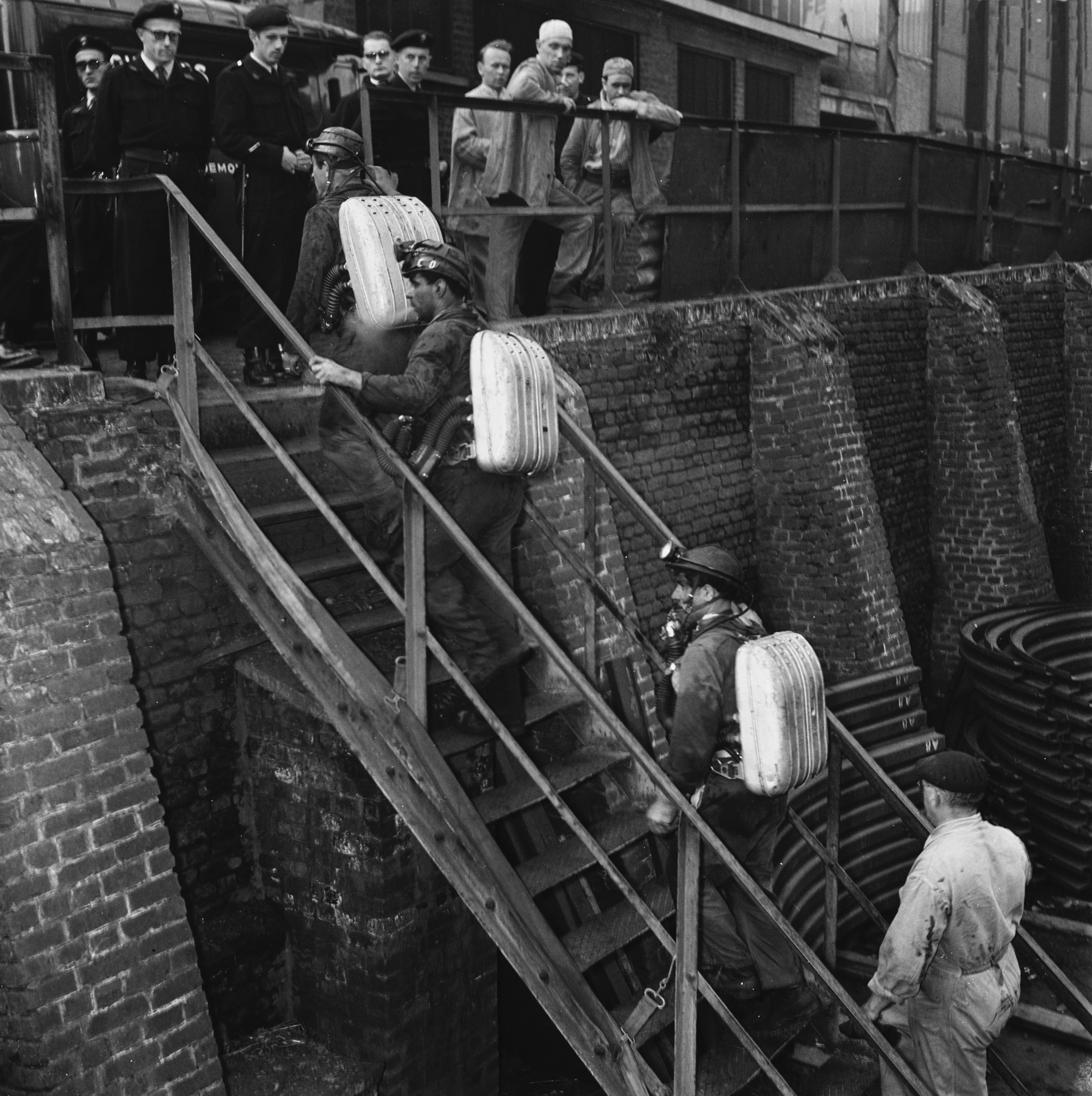 Collectie / Archief : Fotocollectie Anefo Reportage / Serie : [ onbekend ] Beschrijving : Mijnramp Bois du Caizier , Marcinelle Belgie. Redders met zuurstofapparaten Datum : 9 augustus 1956 Locatie : België, Marcinelle Trefwoorden : mijnbouw, mijnen, rampen, reddingsploegen Persoonsnaam : Bois du Caizier Fotograaf : Rossem, Wim van / Anefo Auteursrechthebbende : Nationaal Archief Materiaalsoort : Negatief (zwart/wit) Nummer archiefinventaris : bekijk toegang 2.24.01.03 Bestanddeelnummer : 907-9412